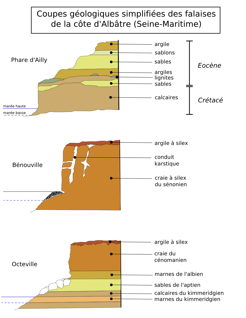 coupe géologique des falaises de la côte d'Albatre, Seine-Maritime